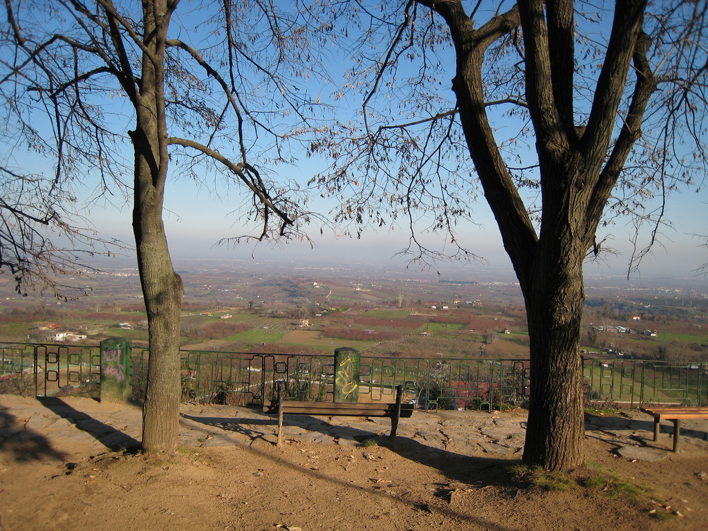 Поглед към областта Сланица от парка Киоски в центъра на Негуш